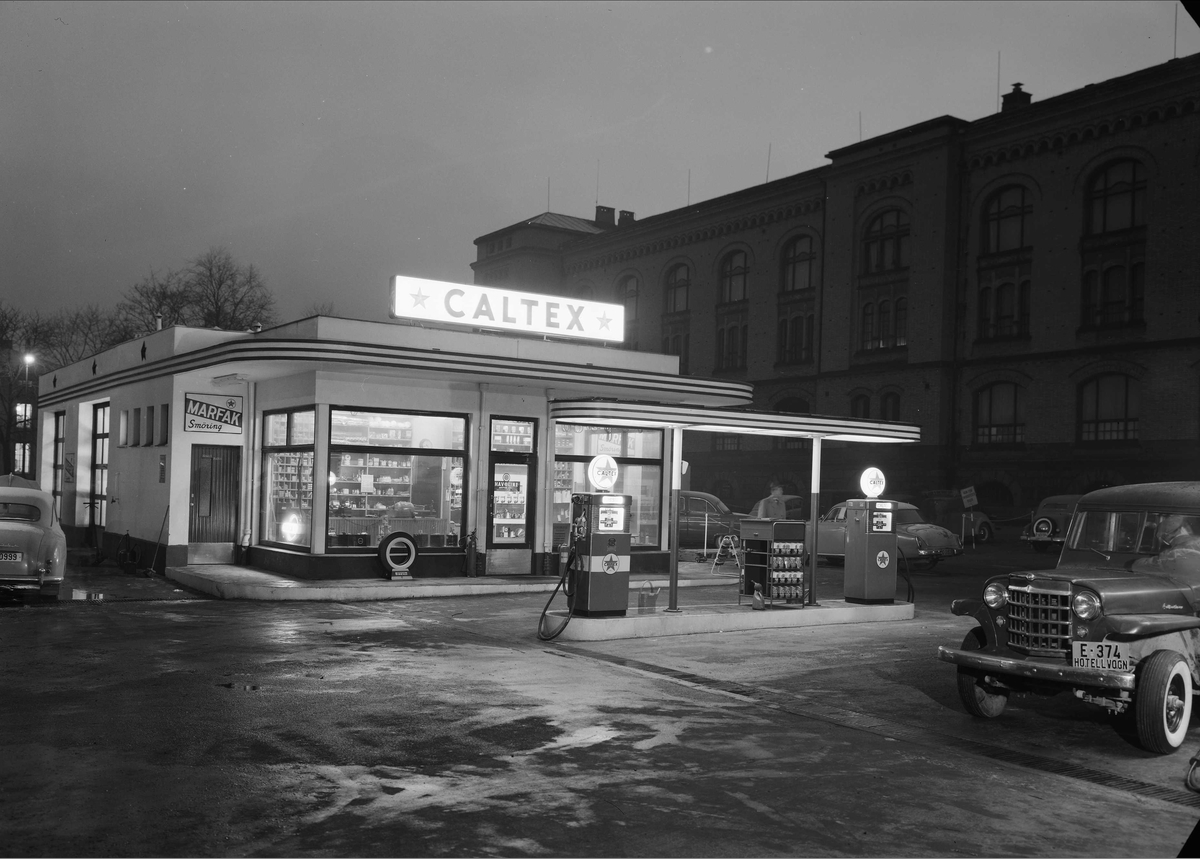 Caltex bensinstasjon, biler, Historisk museum, nattemørke